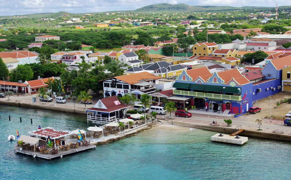 Hafen Kralendijk, Bonaire